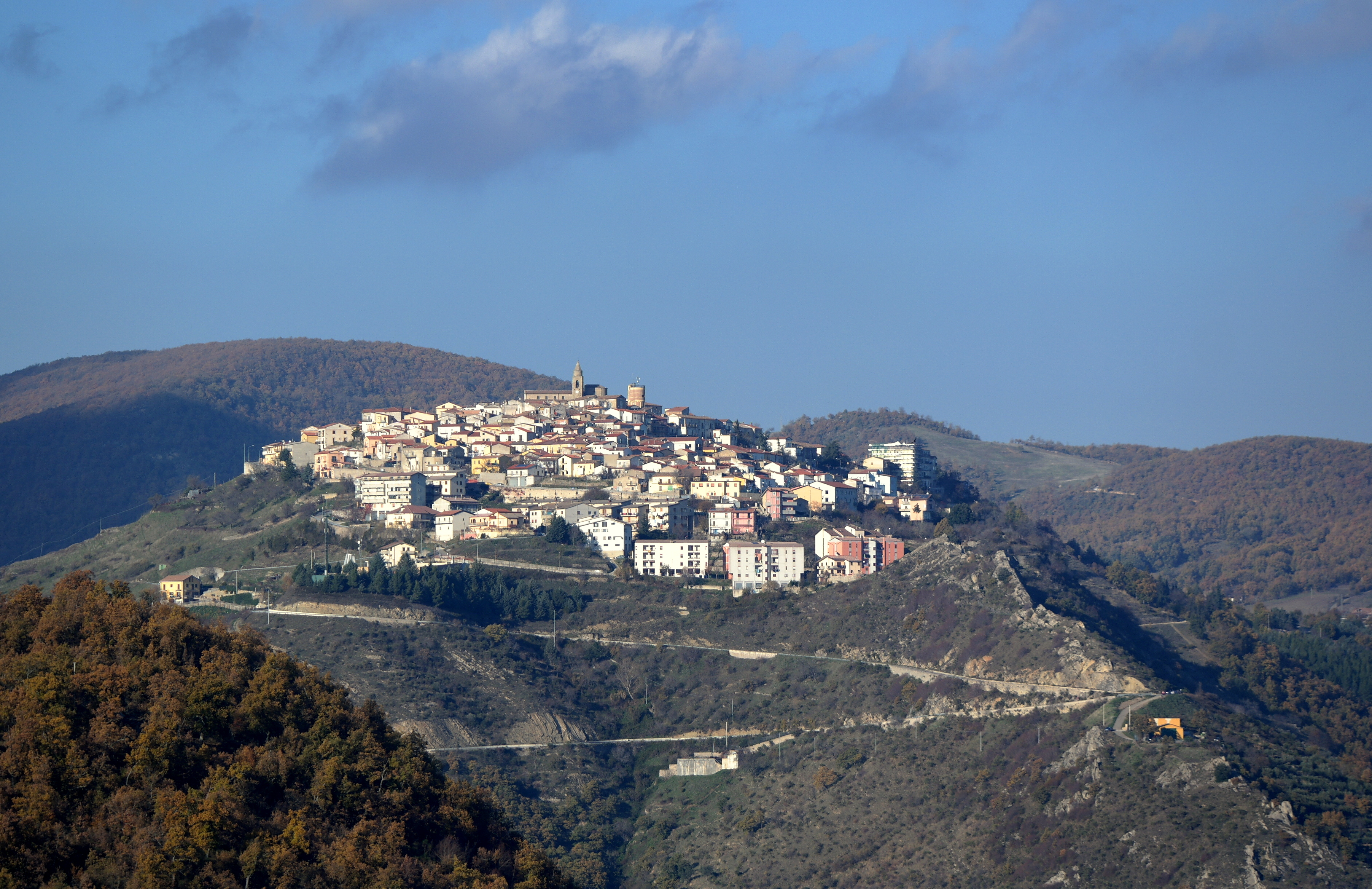 Veduta di Albano di Lucania (Potenza)